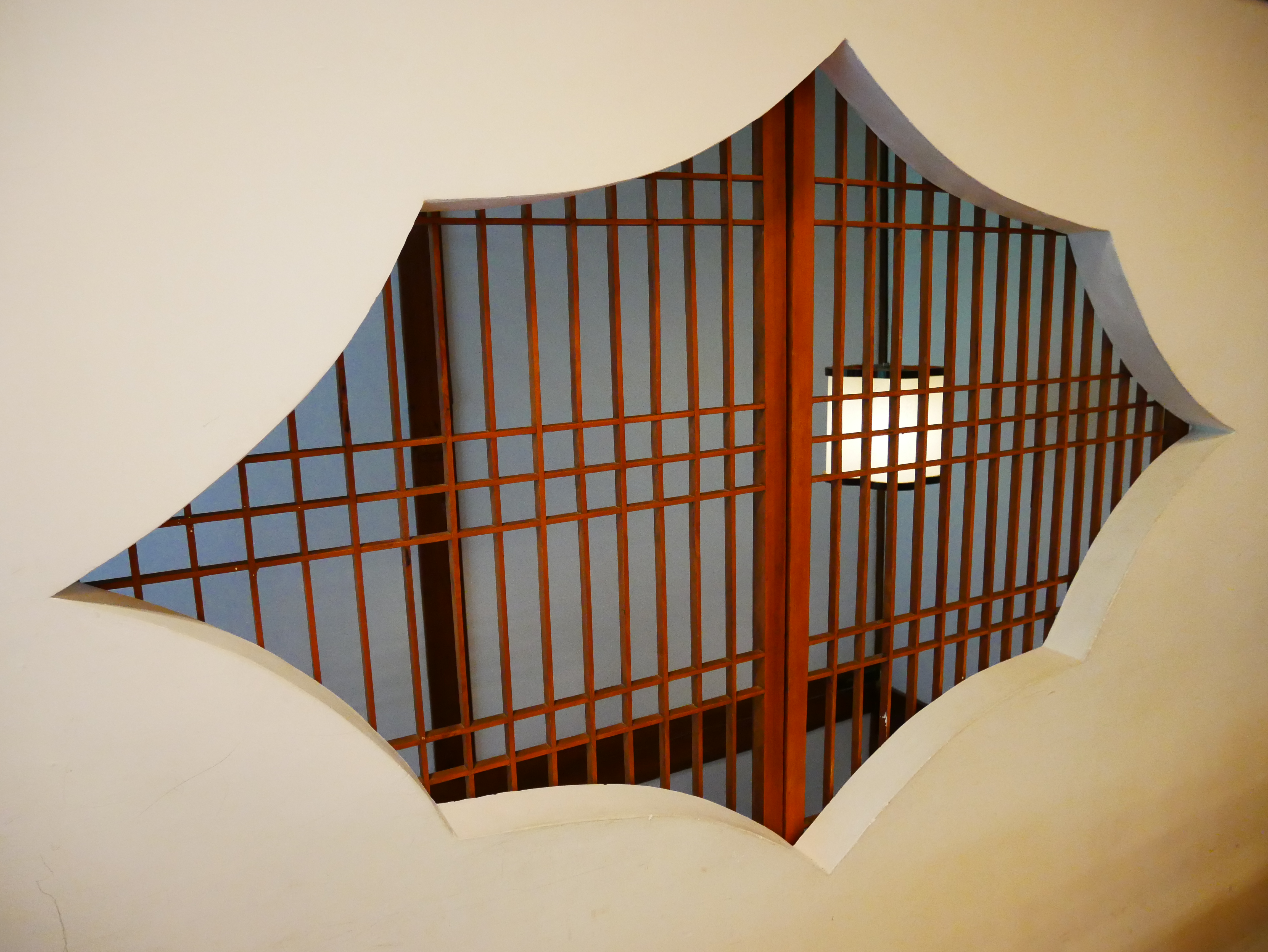 北投文物館大廣間障子窗，臺北市北投區新北投次分區林泉里